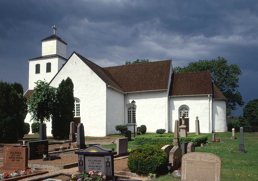 Tönnersjö kyrka i södra Halland. Foto: ÅkeJohansson